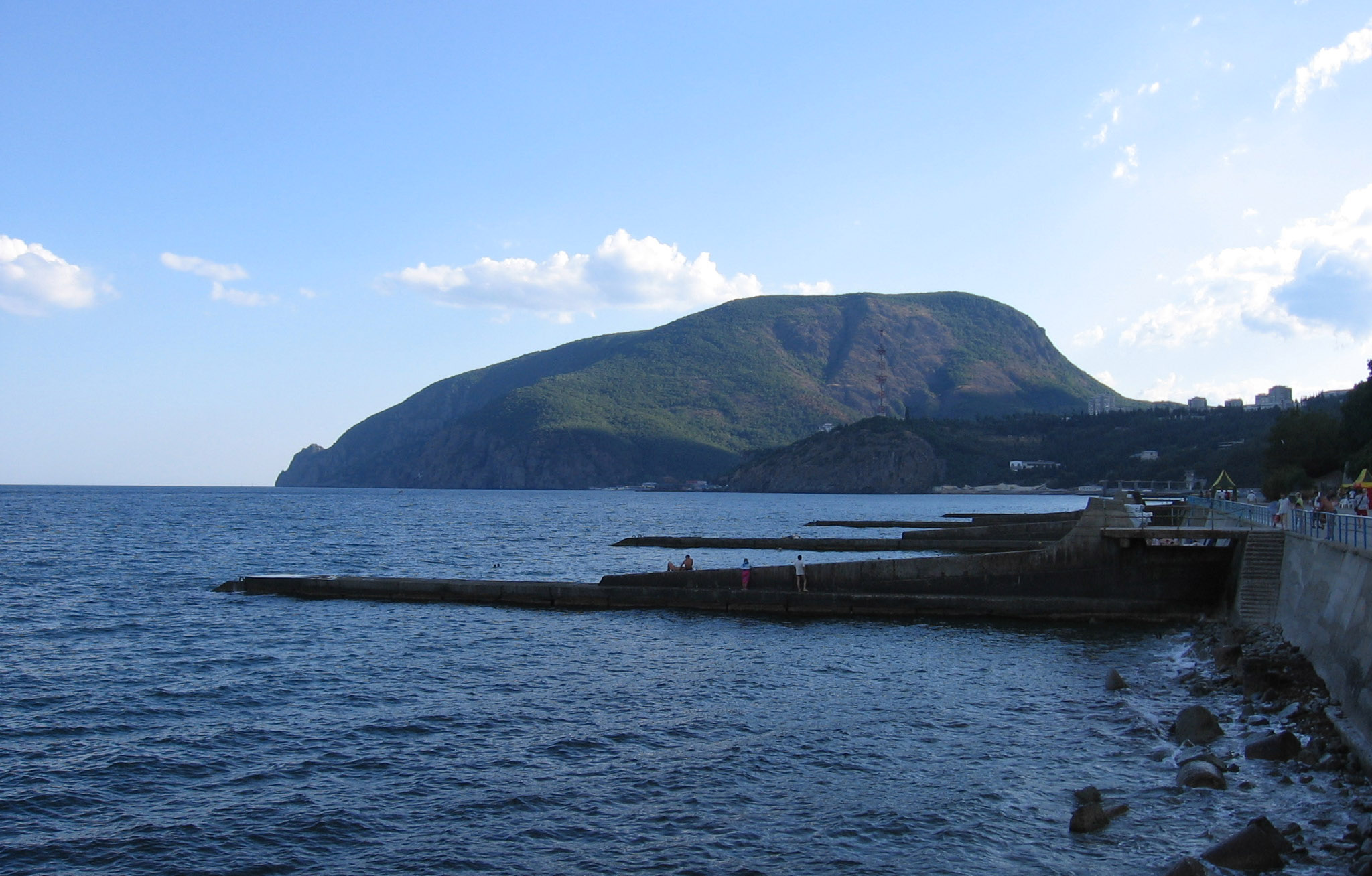 гора Аю-Даг, Крым